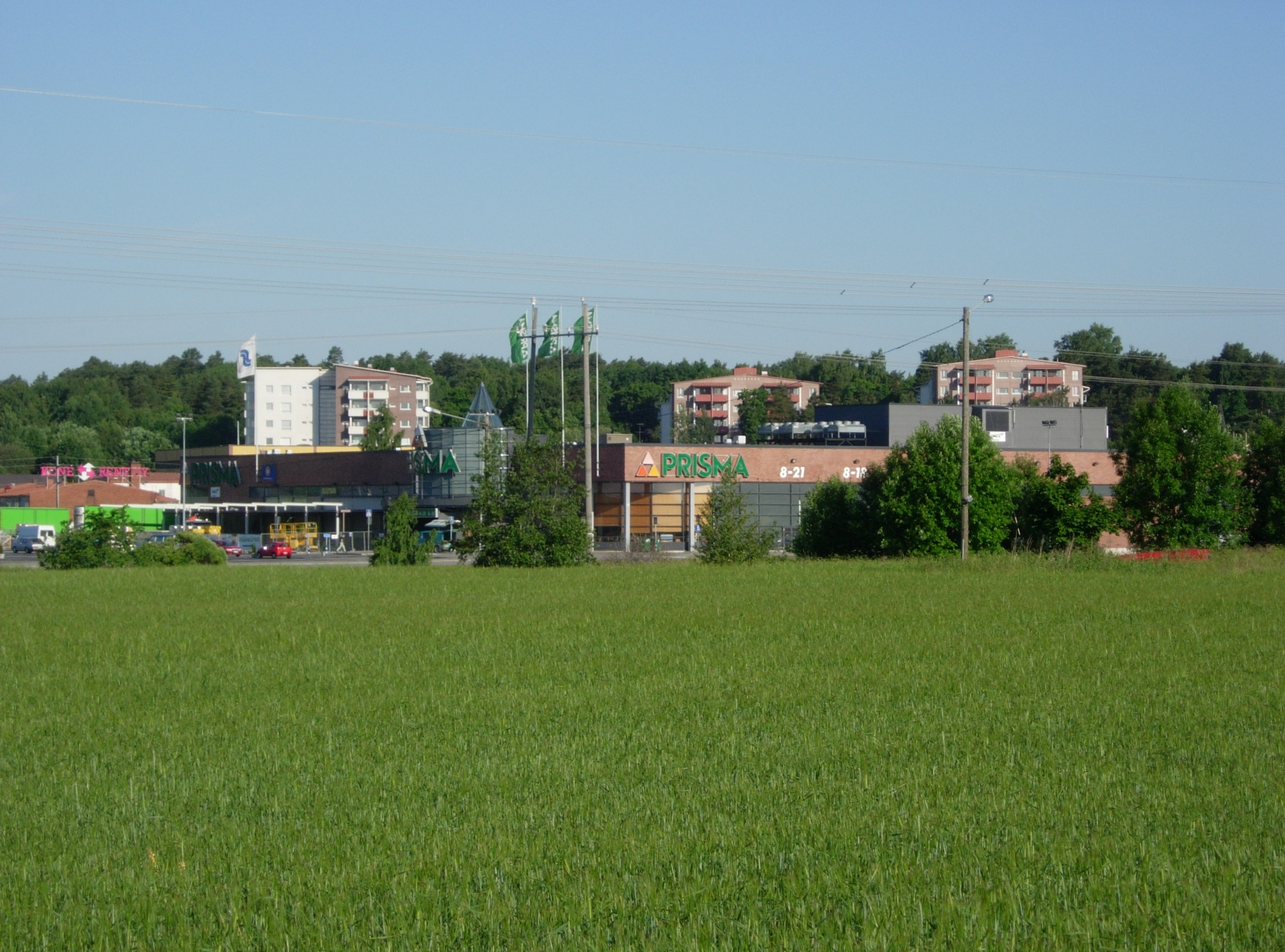 Tampereentien Prisma, Turku. Kuvattu Koroistentieltä, Räntämäestä.